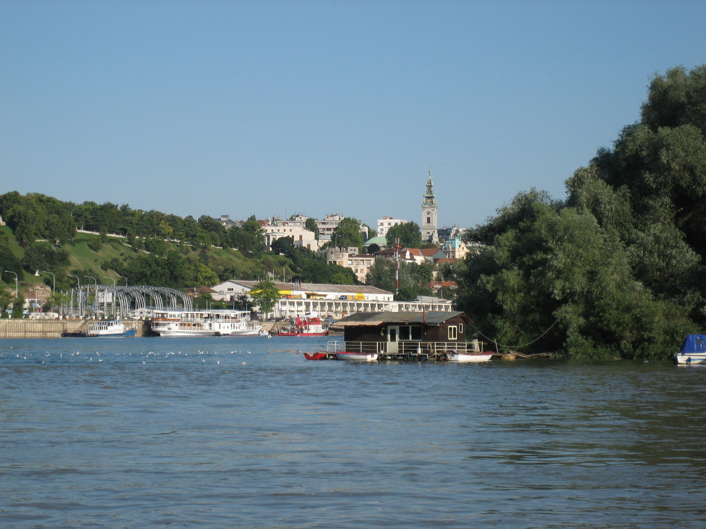 Belgrade, capitale de la Serbie